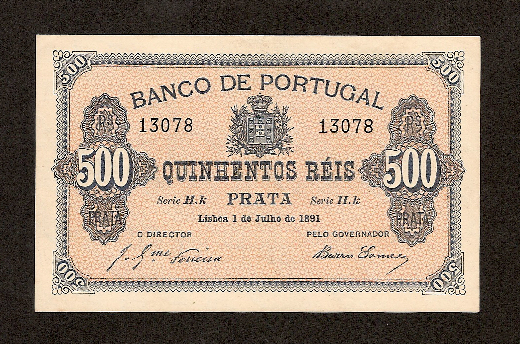 Cédula do Banco de Portugal de 500 réis Prata de 1 de julho de 1891. Assinada, pelo Governador, Henrique de Barros Gomes.